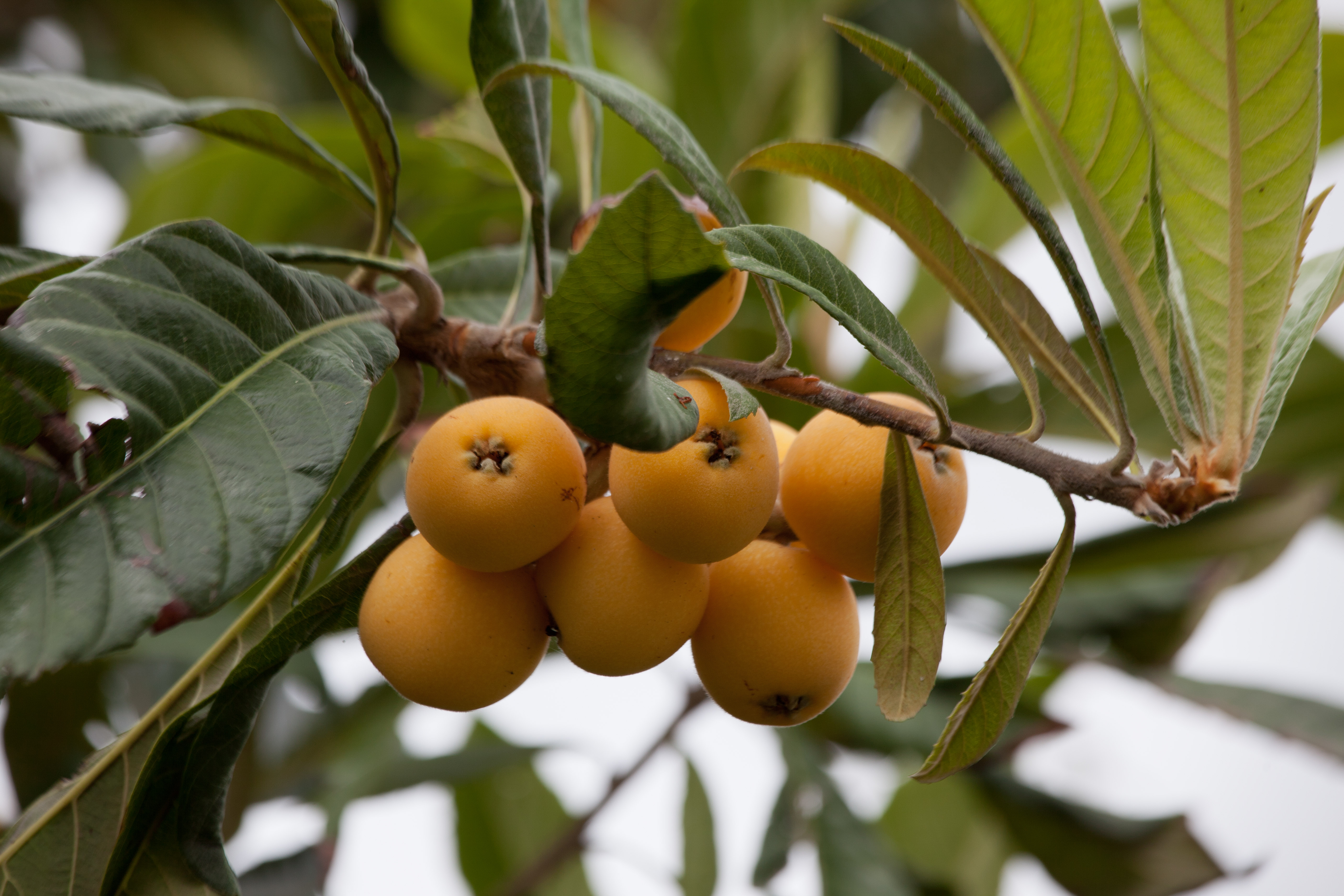 Unos nísperos, en su árbol.